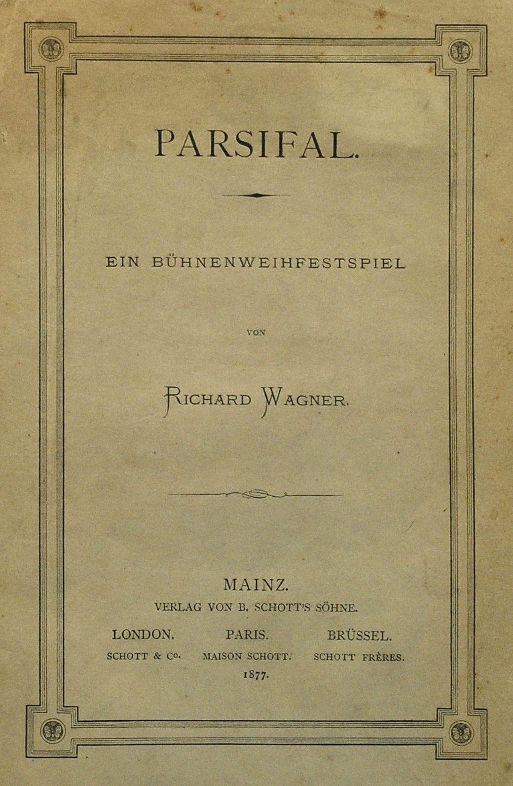 Wagner, Richard: Parsifal. Ein Bühnenweihfestspiel. Mainz: B. Schott's Söhne 1877, 81 Seiten + 11 Seiten Verlagsanzeigen, 1.Auflage (Wilpert/Gühring² 36). Textbuch als Original-Broschur mit typographisch gestaltetem Deckblatt.